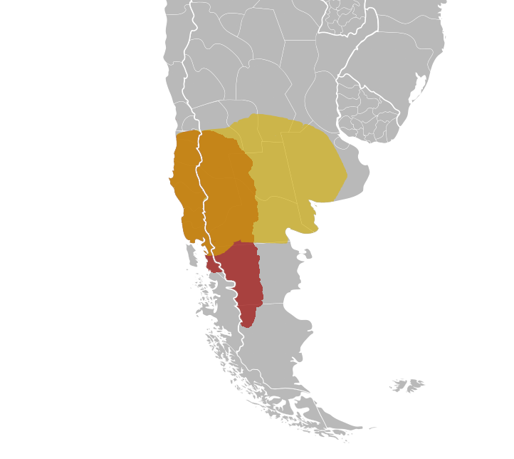 Territorios mapuches ancestrales Territorios mapuches actuales